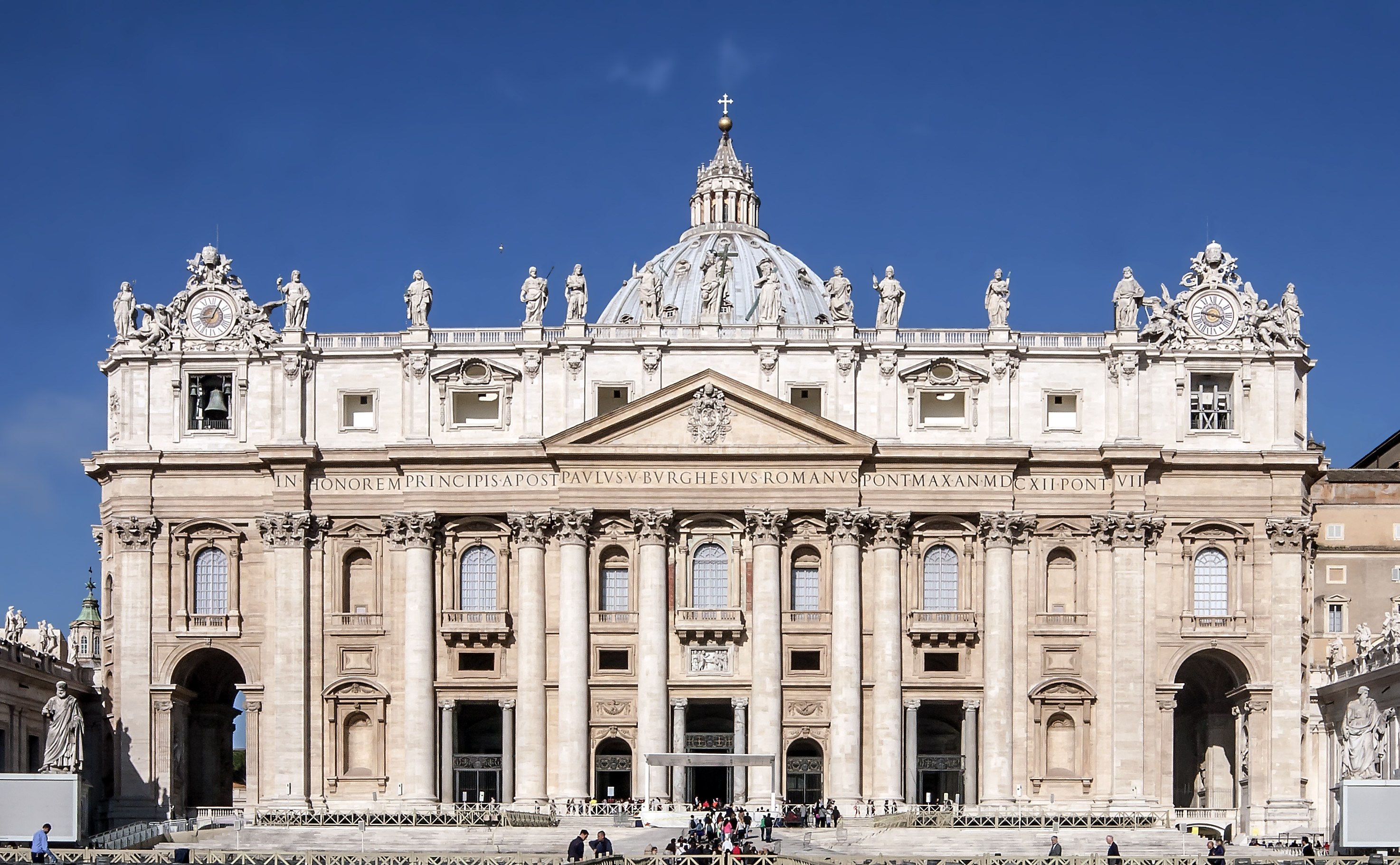 Peterskyrkan i Vatikanstaten.